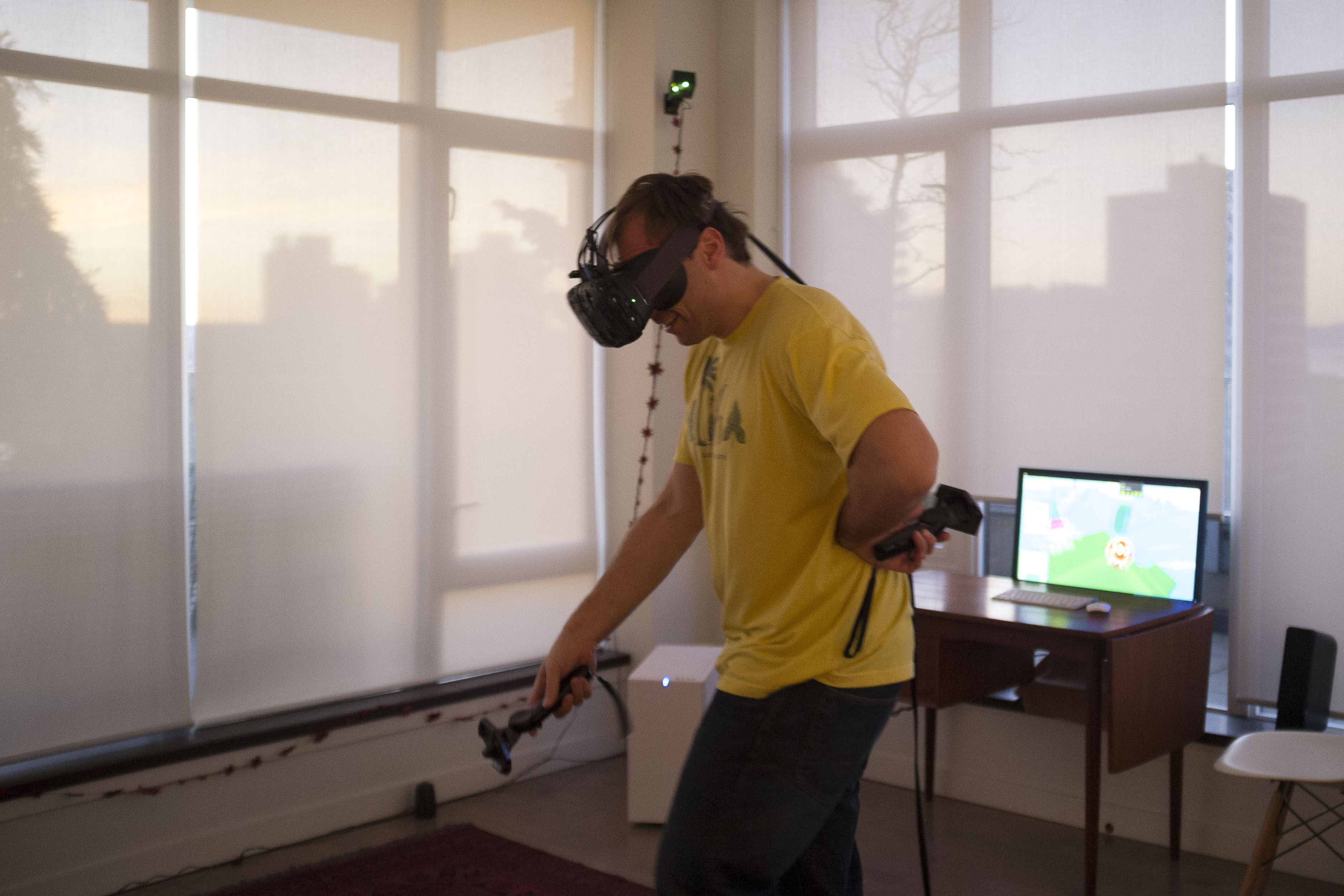 Kyle in VR